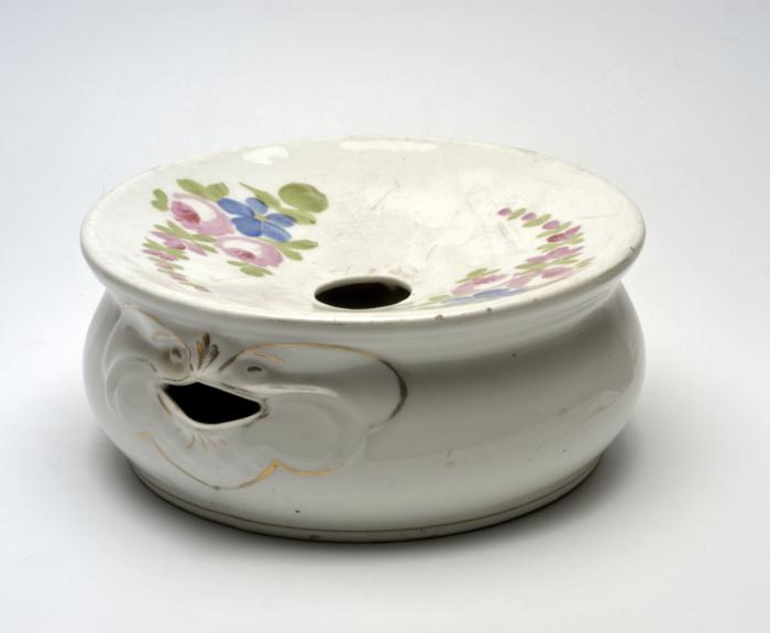 Kwispedoor. Porseleinen spuwbak